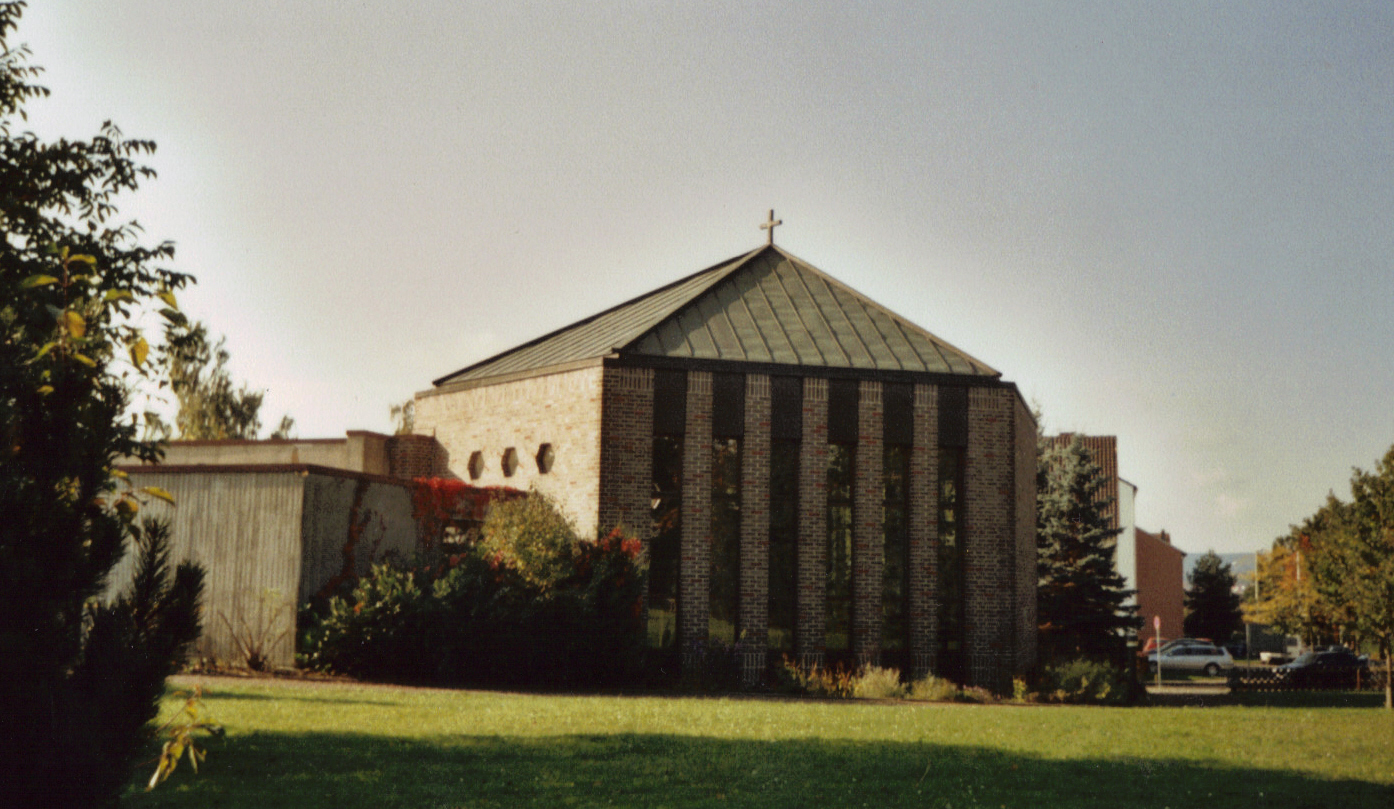 Matthäuskirche (1983)